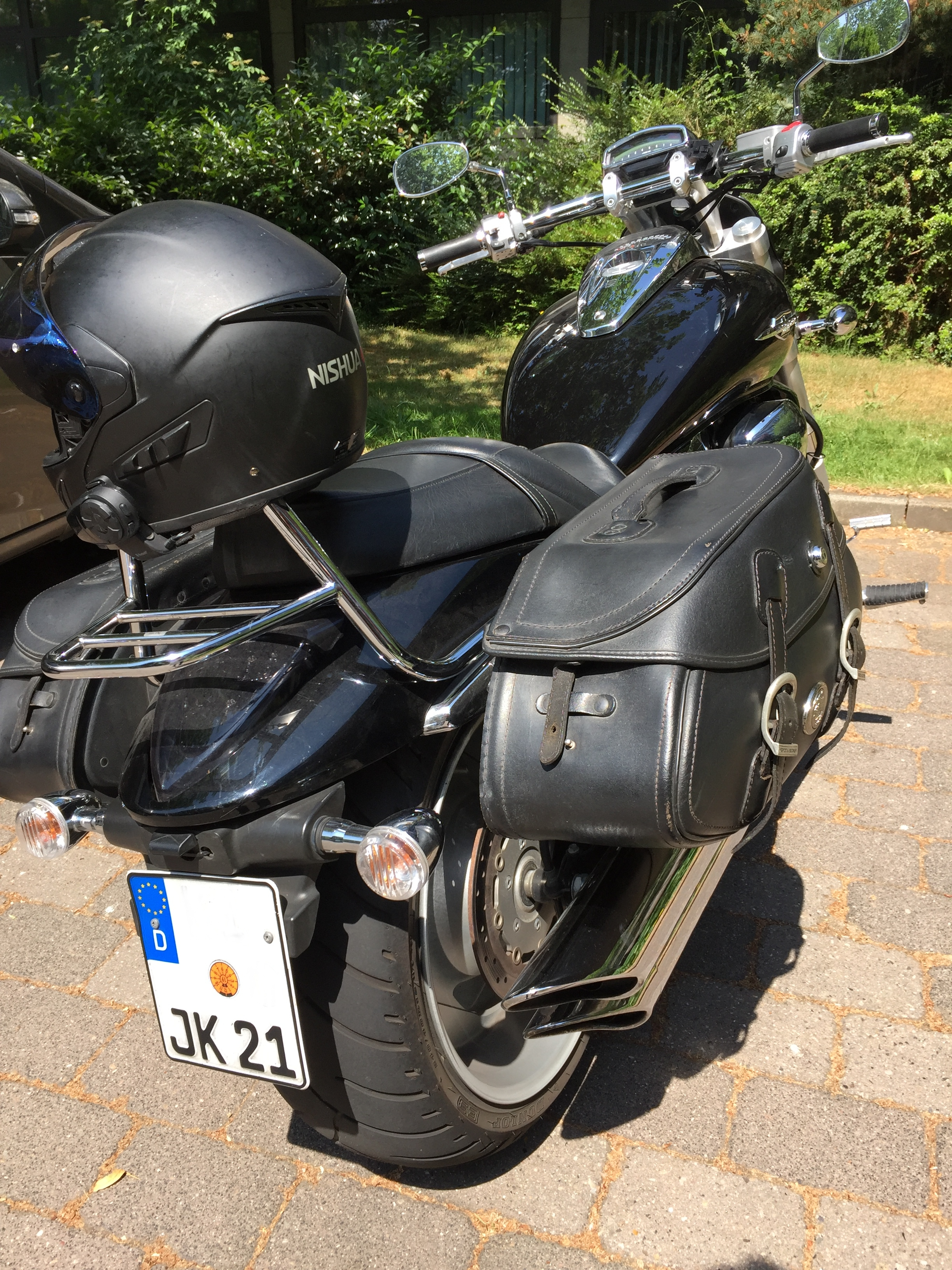 Suzuki Intruder M1800R Heckansicht